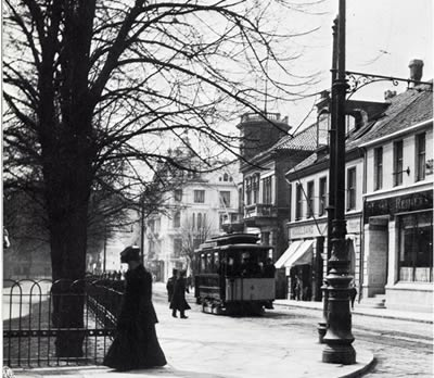 Trikken i Olav Kyrres gate i Bergen tidleg på 1900-tallet.